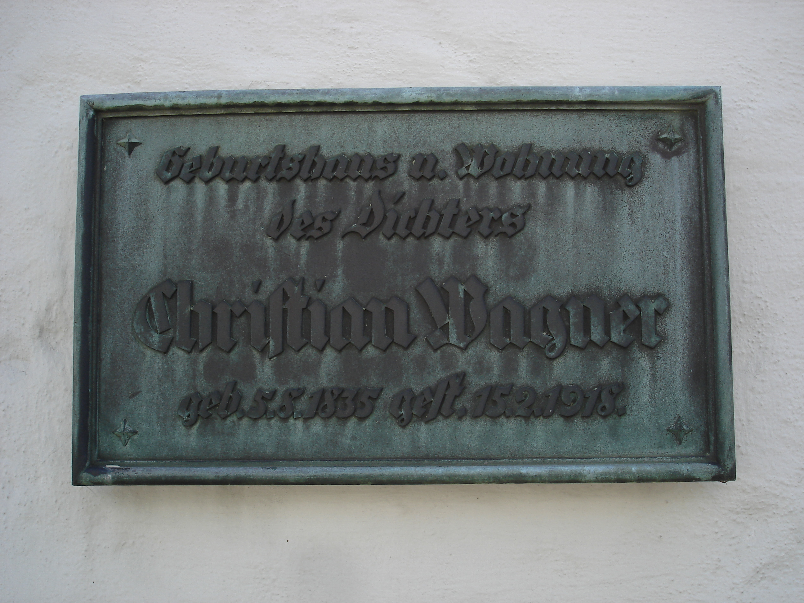 Gedenktafel am Wagnerhaus in Warmbronn